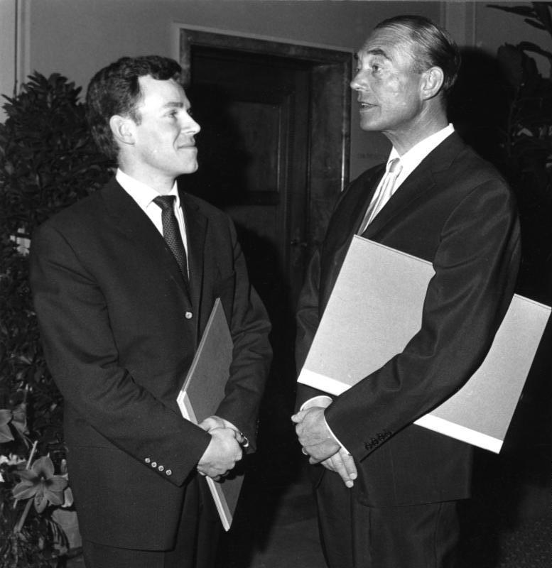 18.3.1960 West-Berlin Der "Berliner Kunstpreis - Jubiläumsstiftung 1848/1948 " für das Jahr 1960 verliehen